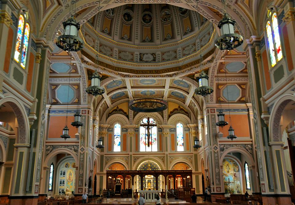 Inneres der Kathedrale